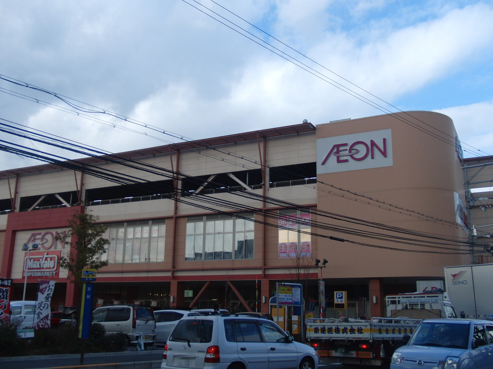 イオンタウン東大阪を撮影